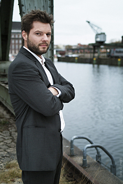 Portrait von Peter Thorwarth, fotografiert von Matti Hillig. Das Foto entstand am 1.12.2005 in Berlin. Peter Torwart (geboren am 3. Juni 1971 in Dortmund) ist ein deutscher Regisseur und Drehbuchautor. Höhere Auflösung von diesem und weiteren Fotos sind verfügbar. Bitte kontaktieren Sie mich unter